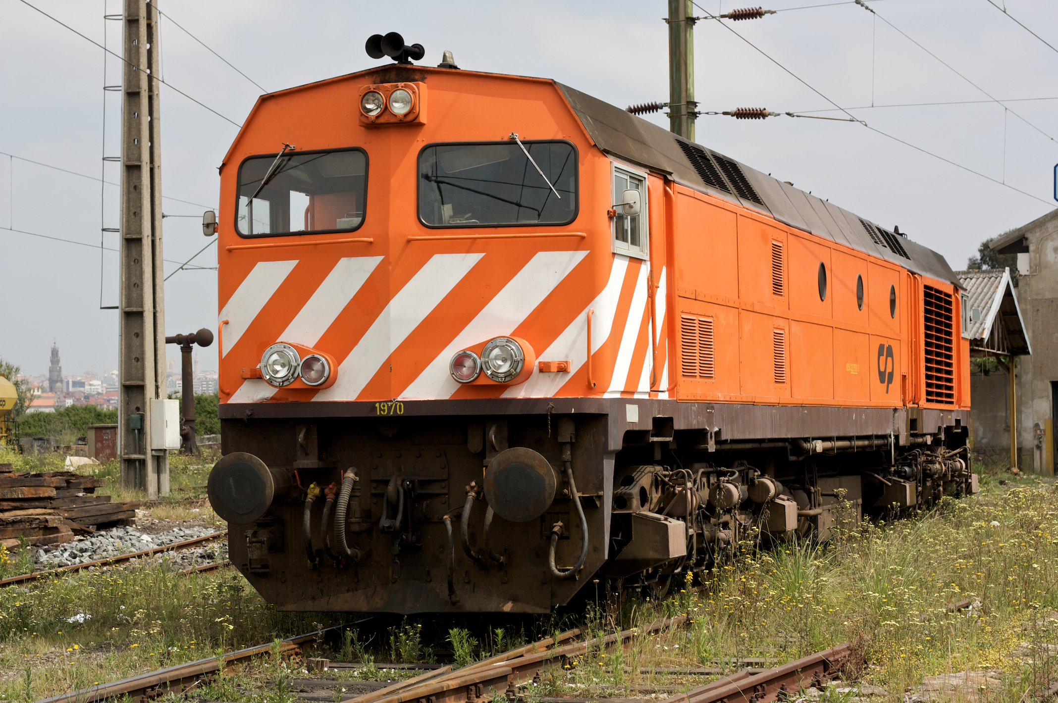 Local: Estação de Vila Nova de Gaia (depósito) [Linha do Norte, PK 332] Data e hora: 7 de Maio de 2009 [12h06] Material: Locomotiva 1970 [Bombardier]